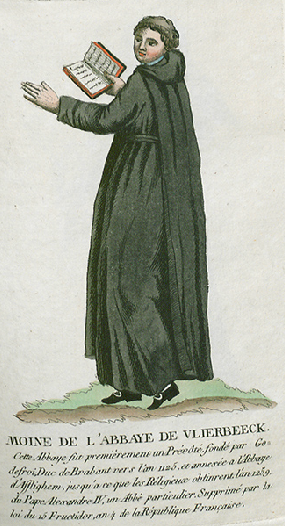 Collection de costumes de tous les ordres monastiques, supprimés à differentes époques, dans la ci-devant Belgique, Bruxelles, Philippe Joseph Maillart et sœur, 1811